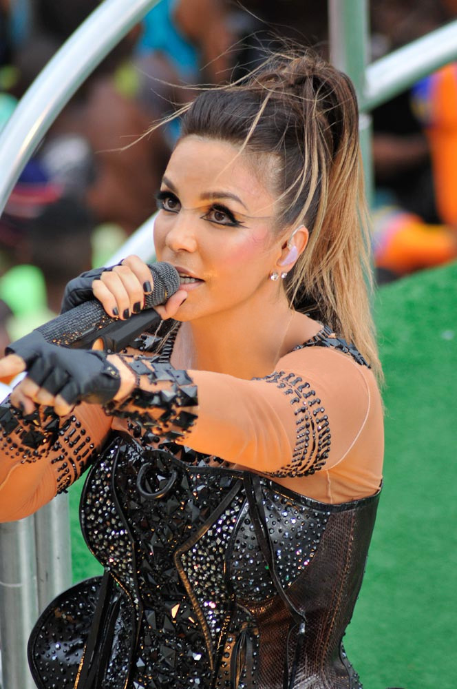 Ivete Sangalo no Carnaval 2010 no camarote Oceania.